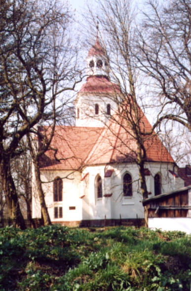 Duninowo - kościół